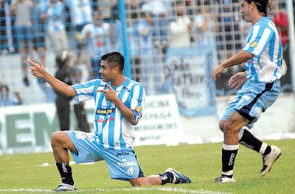 ClaudioSarria